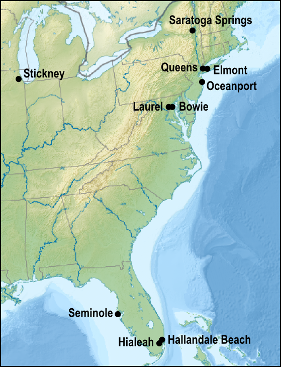 Karte der Orte an denen Kelso in seiner Karriere Galopprennen lief.